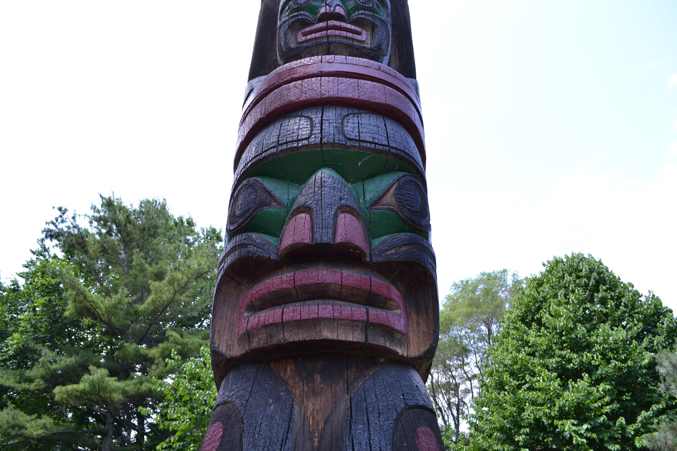 Mât totémique Kwakiutl - Montréal